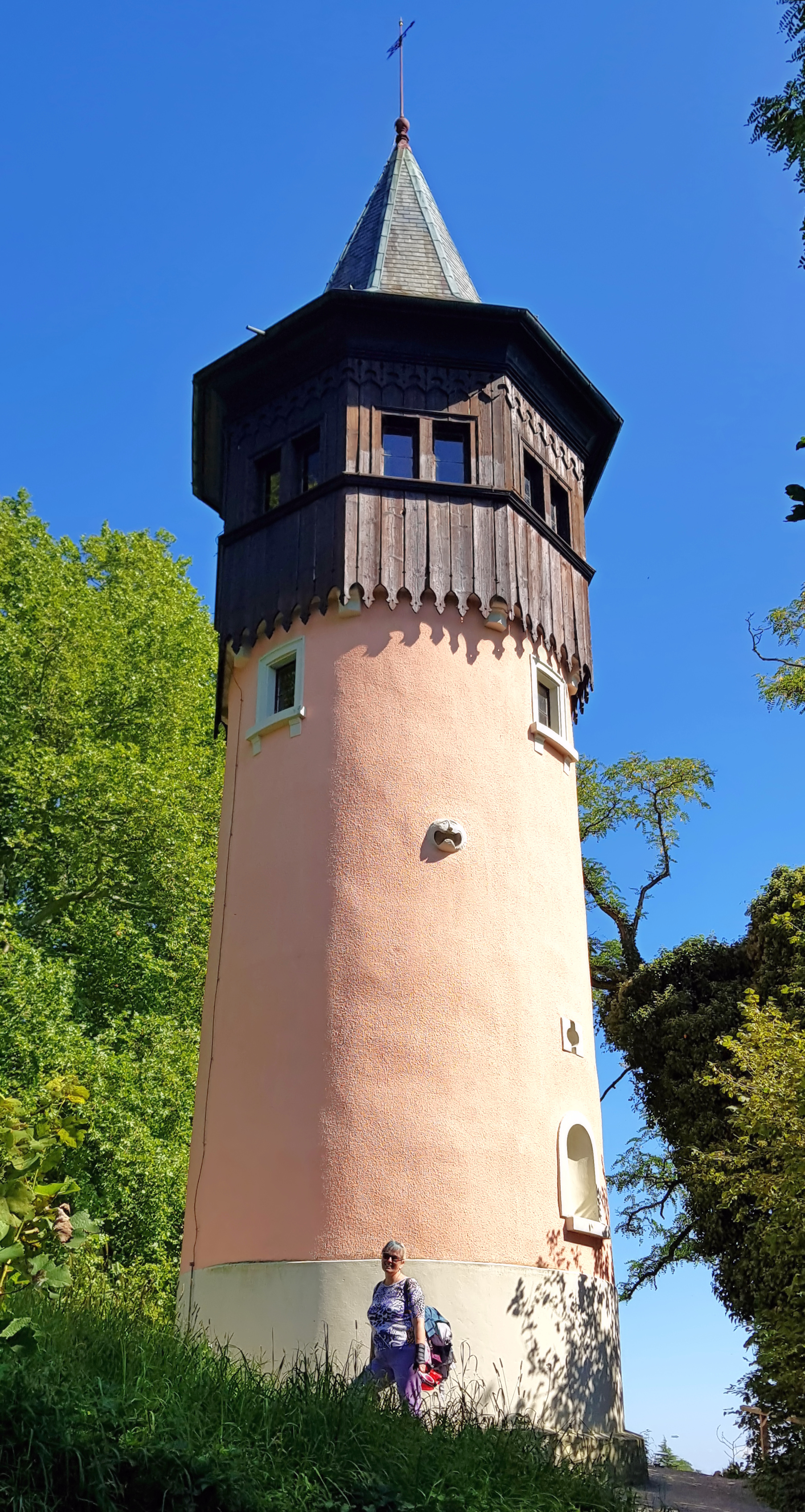 Der sogenannte Schwedenturm auf Insel Mainau im Bodensee, 2019